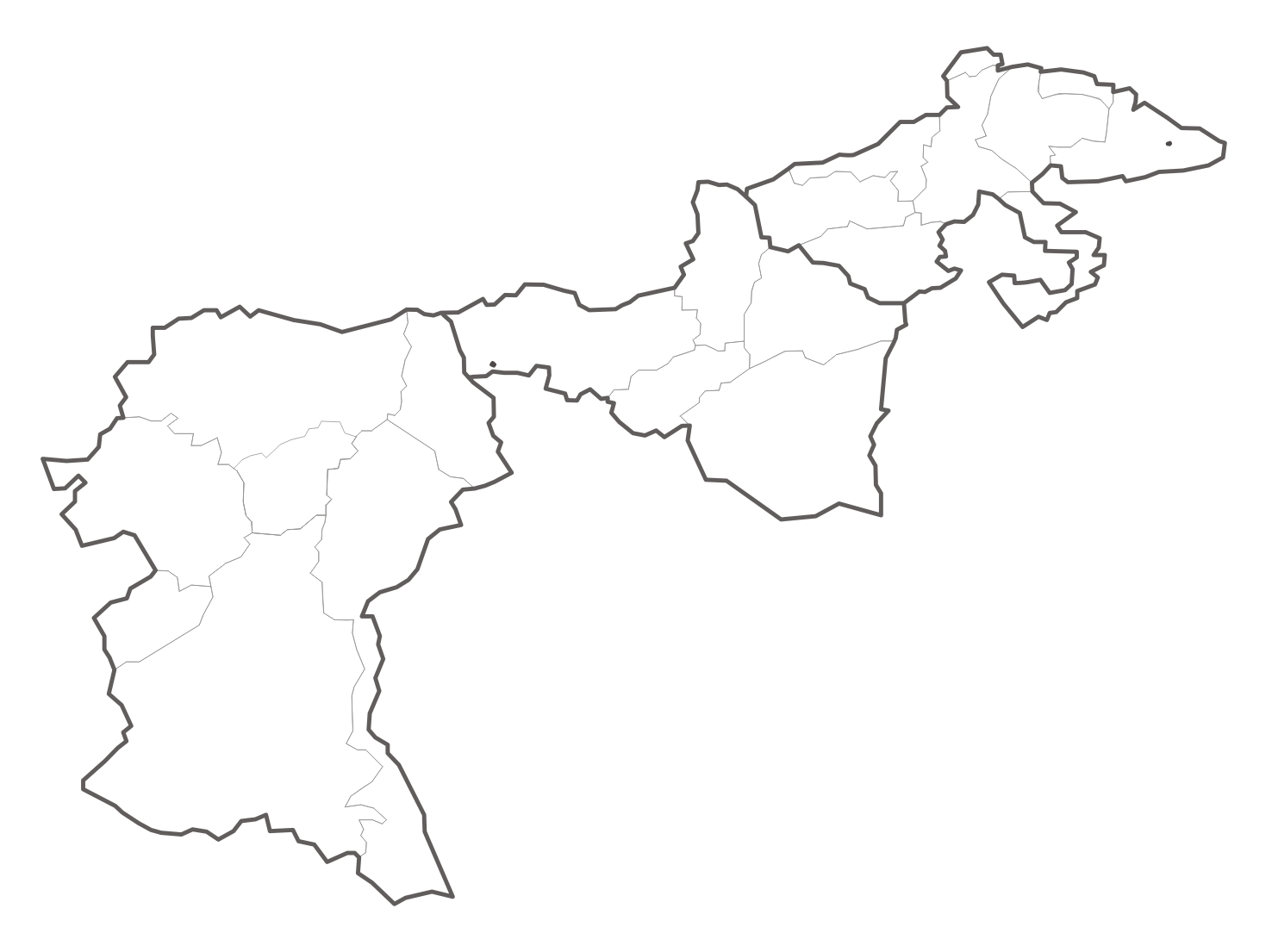 Municipalities in Canton Appenzell Ausserrhoden / Gemeinden des Kantons Appenzell Ausserrhoden